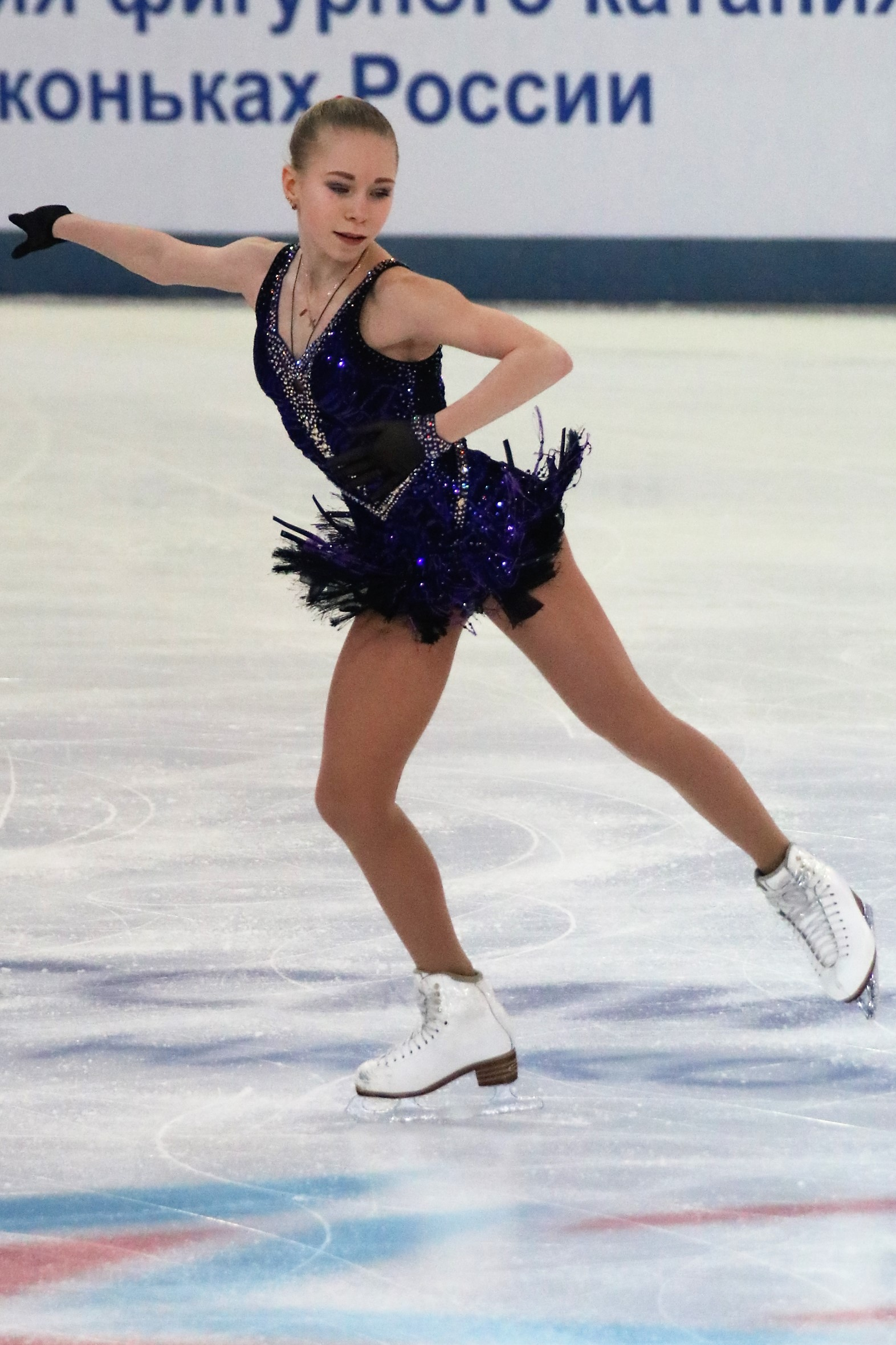 Виктория Васильева на чемпионате России по фигурному катанию на коньках 2019